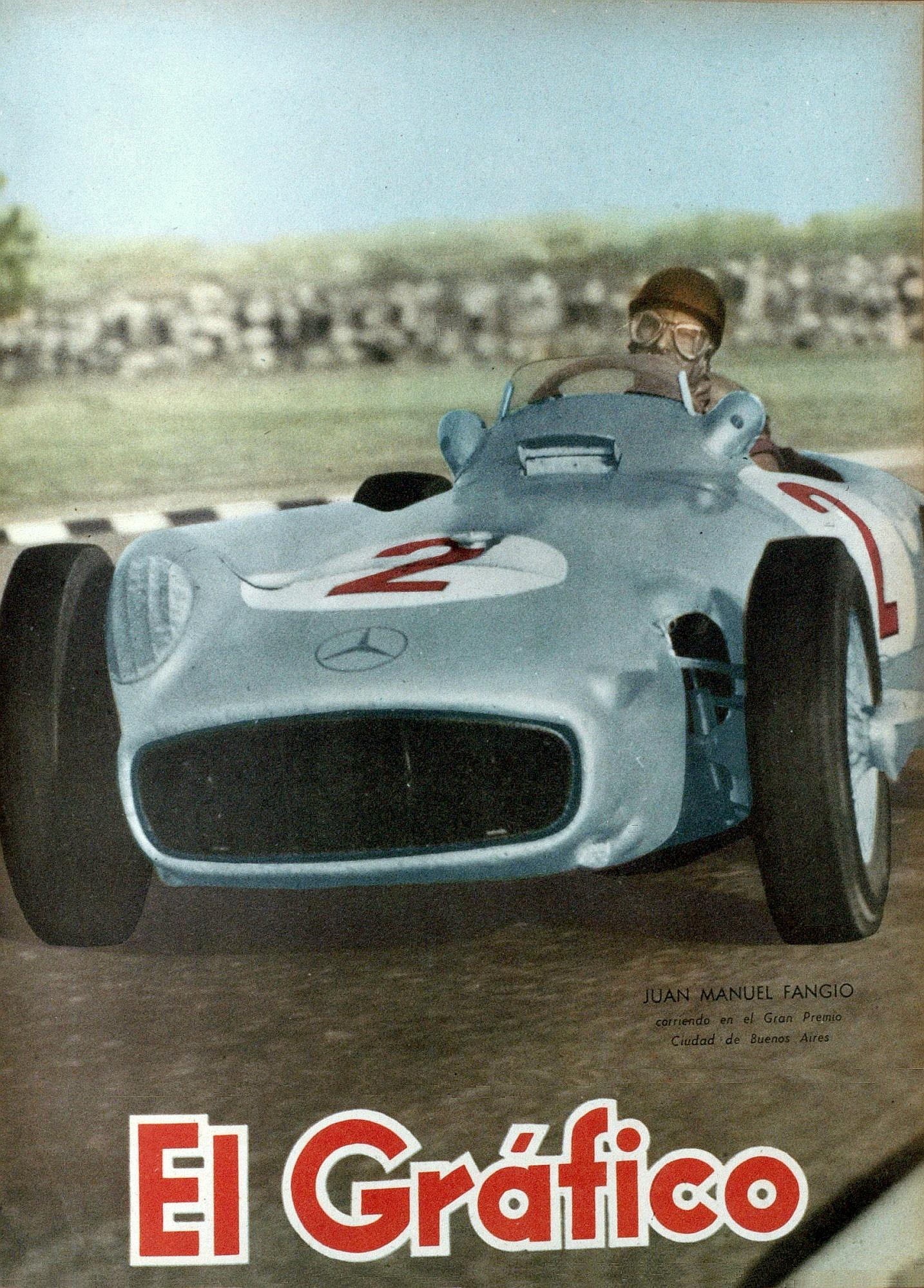 El Grafico del 11 de Febrero de 1955. Edicion 1852 - Fangio on Mercedes-Benz W196, 1955.